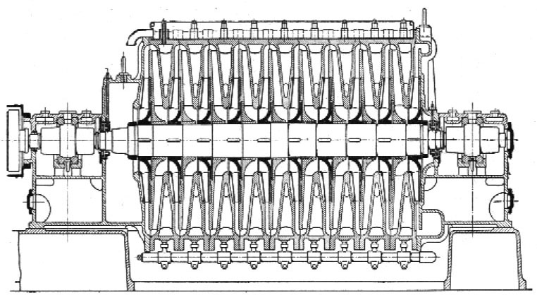 Többfokozatú radiális komresszor